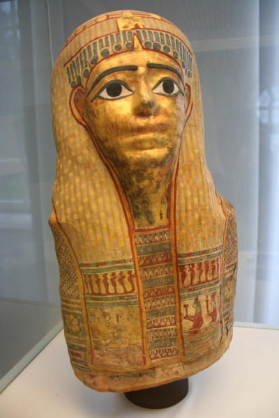 Ägyptisches Museum